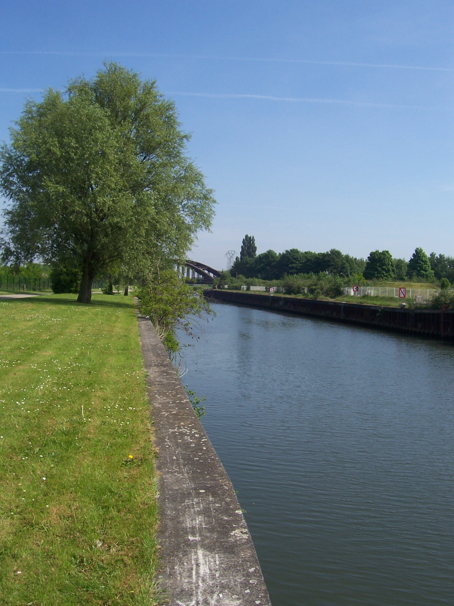 Anzin canal Escaut.JPG